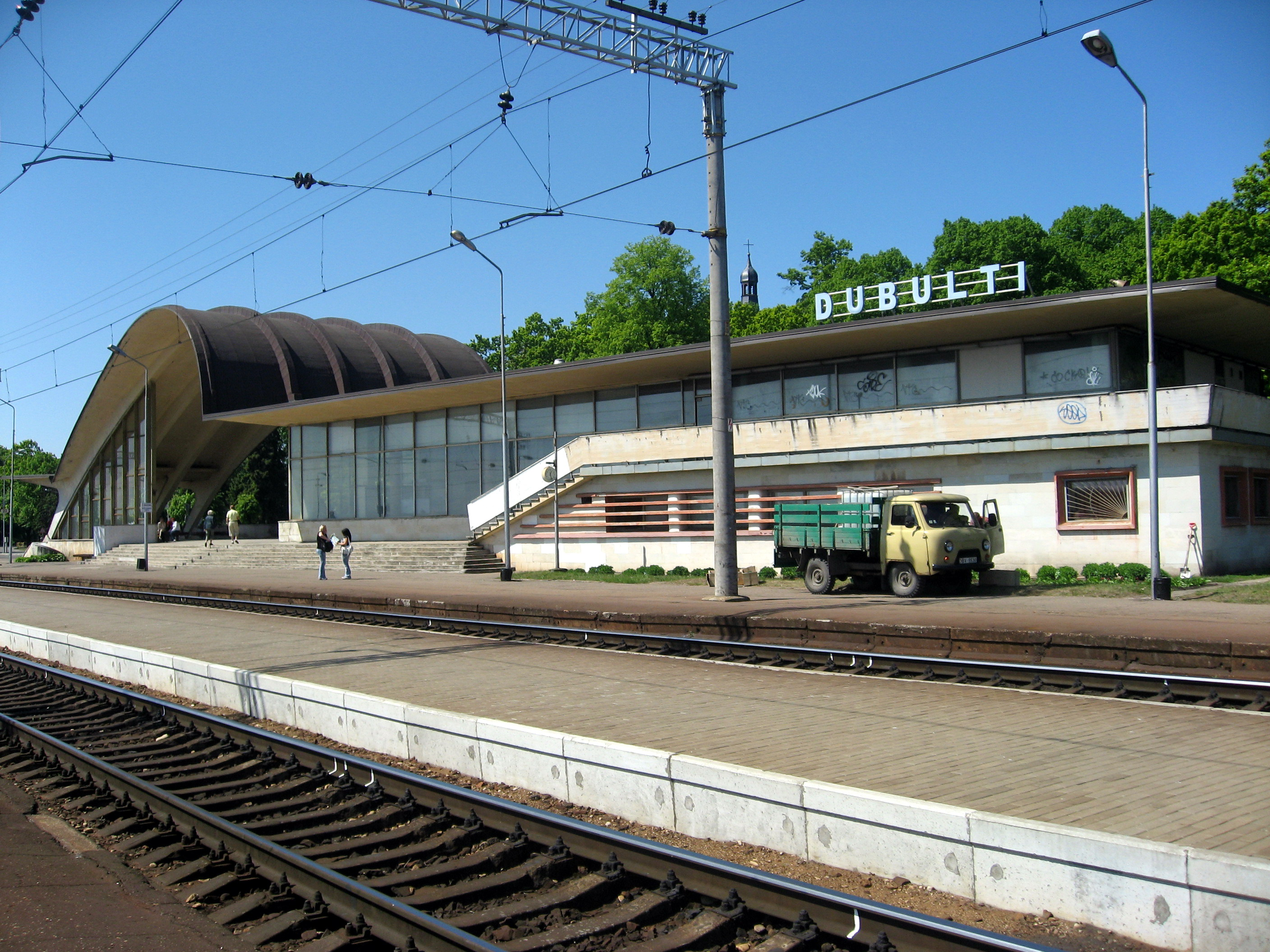 Zastávka Dubulti